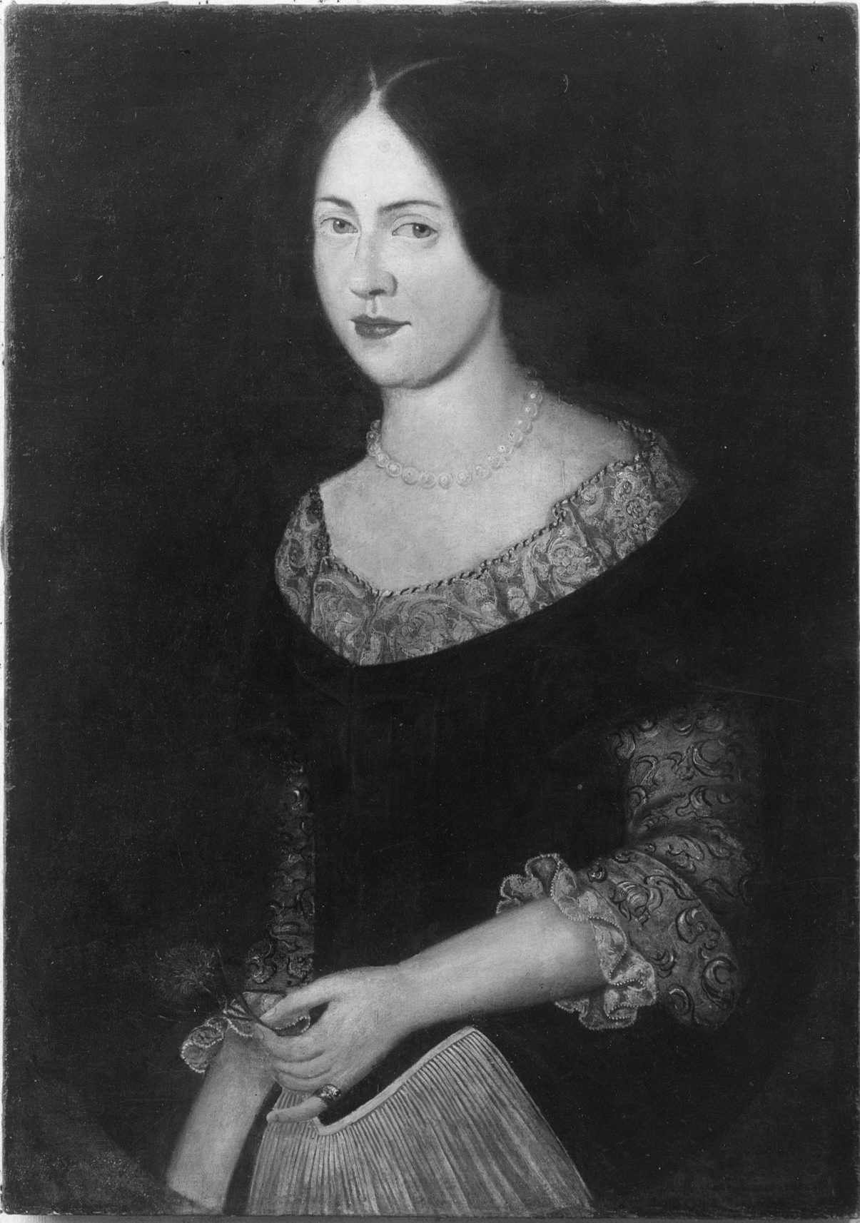 Aase Povelsdatter Paus (1663-1713)